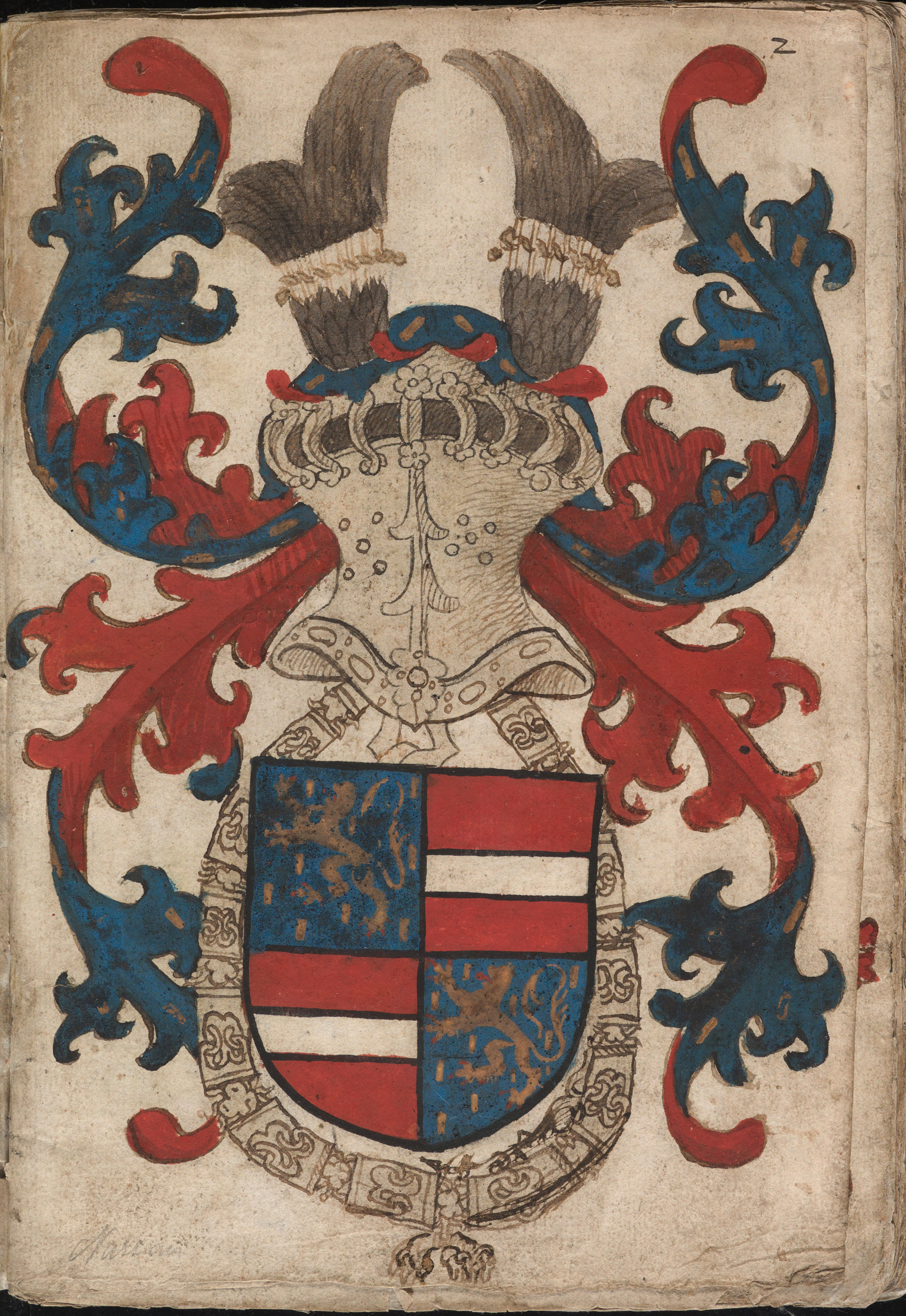 Het eerste wapen in het wapenboek is dat van Engelbrecht II van Nassau (1451-1504). Het combineert de wapens van Nassau en Vianden, de gebieden waarover Engelbrecht het grafelijke bewind voerde. Het wapenschild is omgeven door de keten van de Orde van het Gulden Vlies. Engelbrecht werd in 1473 opgenomen in deze ridderorde, als eerste van zijn geslacht. In 1505 zou ook zijn neef en erfgenaam Hendrik III van Nassau (1483-1538) toetreden tot het selecte gezelschap van Vliesridders.